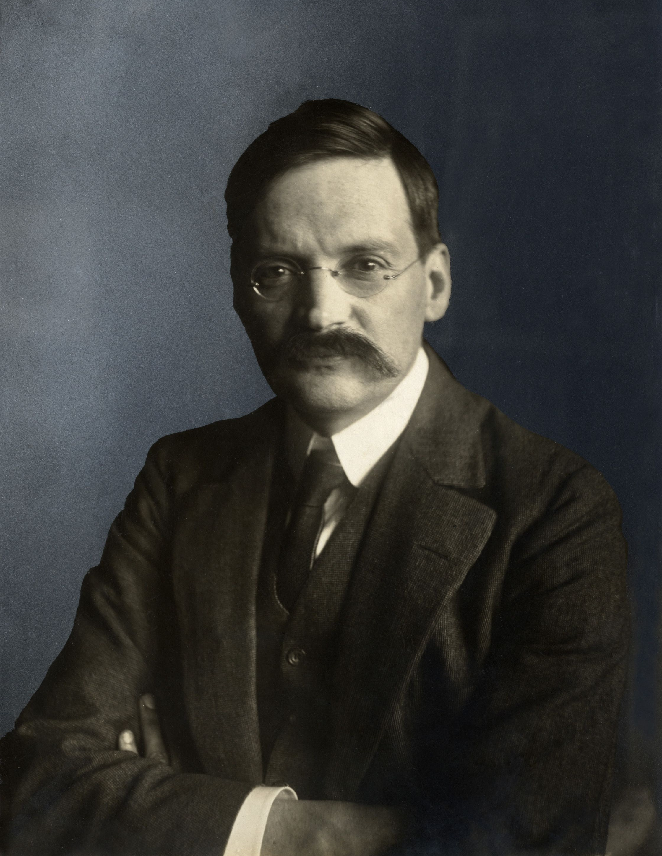 Portret van dirigent en componist dr. Peter van Anrooy. 1917. Omtrek uitgedekt.